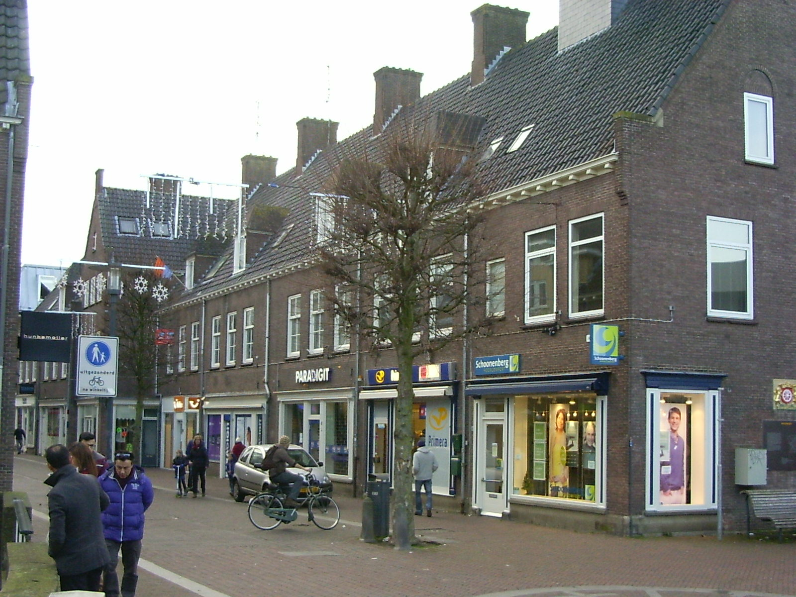 Wageningen, Hoogstraat 101, 103, 105, 107 (van links naar rechts), 109 (hoek), allemaal gemeentelijke monumenten